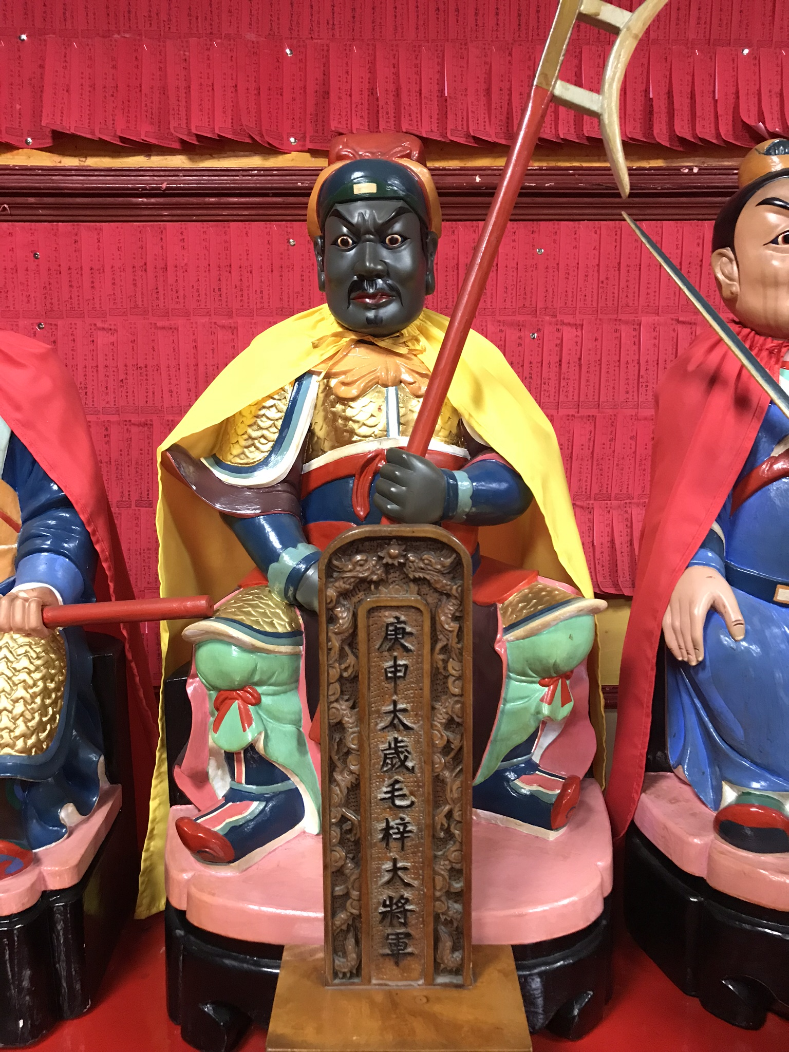 庚申太歲毛梓大將軍神像